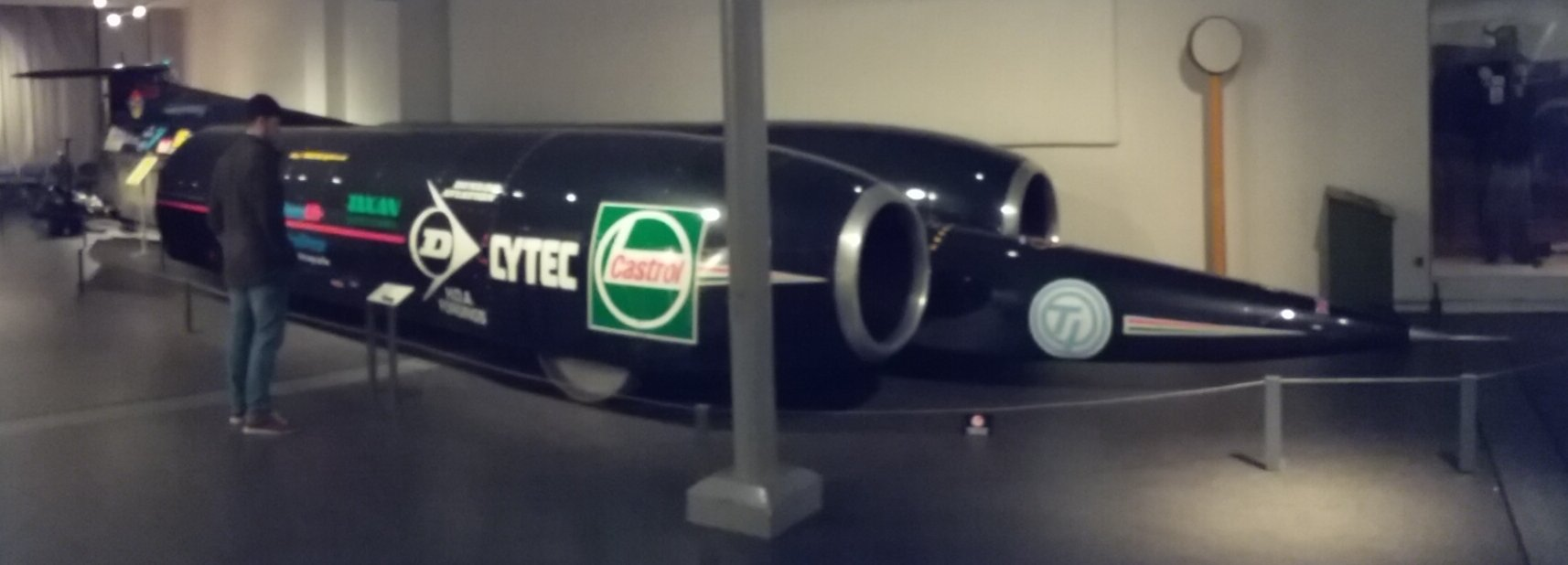 Museo del Transporte de Coventry